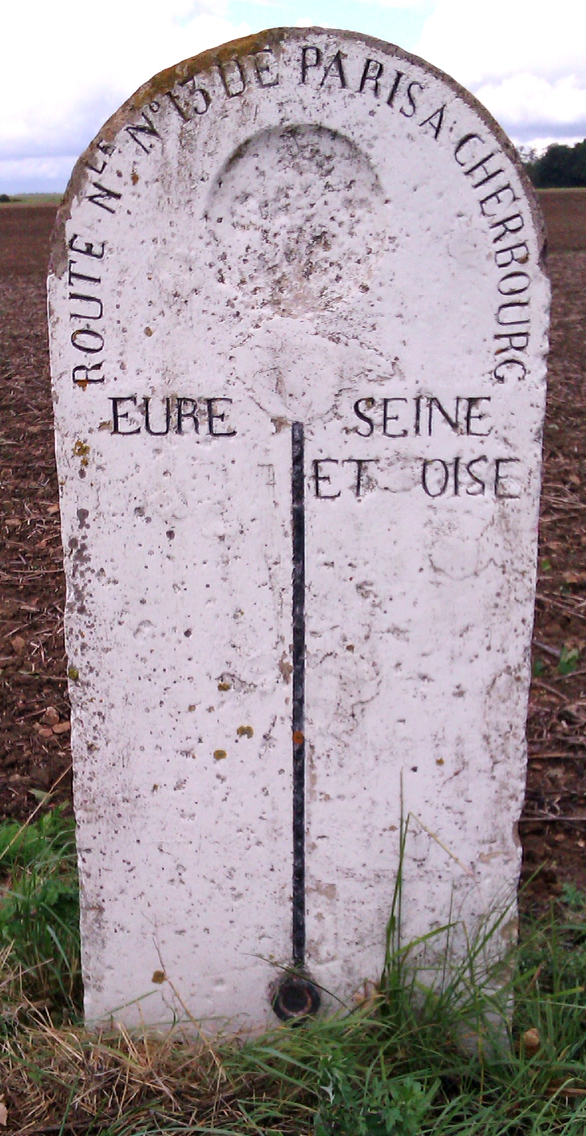 Borne séparant les départements de Seine-et-Oise (actuelles Yvelines) et Eure sur la Route Nationale 13.